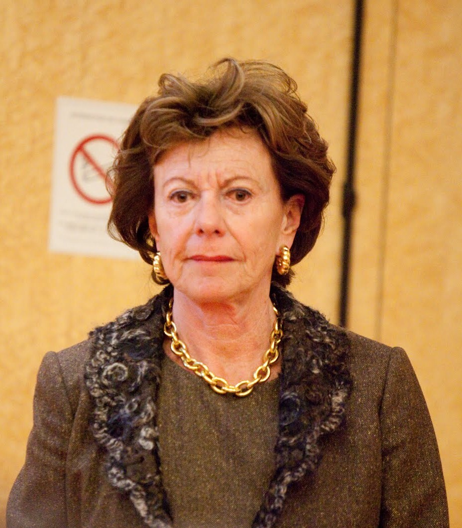 Neelie Kroes lors du colloque ARCEP Neutralité des Réseaux